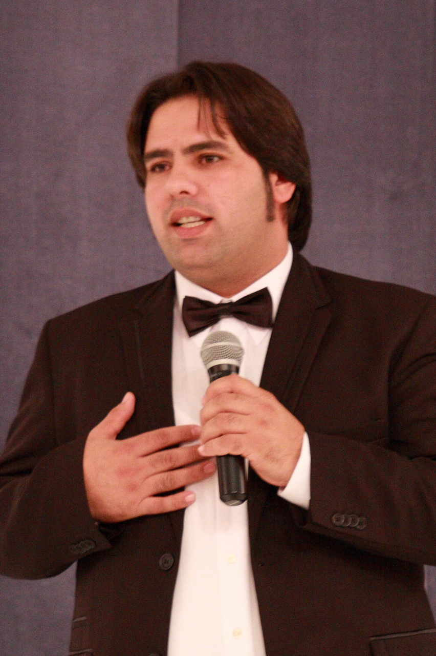 Costel Busuioc la Cina pentru Viata a Pro Vita, noiembrie 2009, Cluj-Napoca.